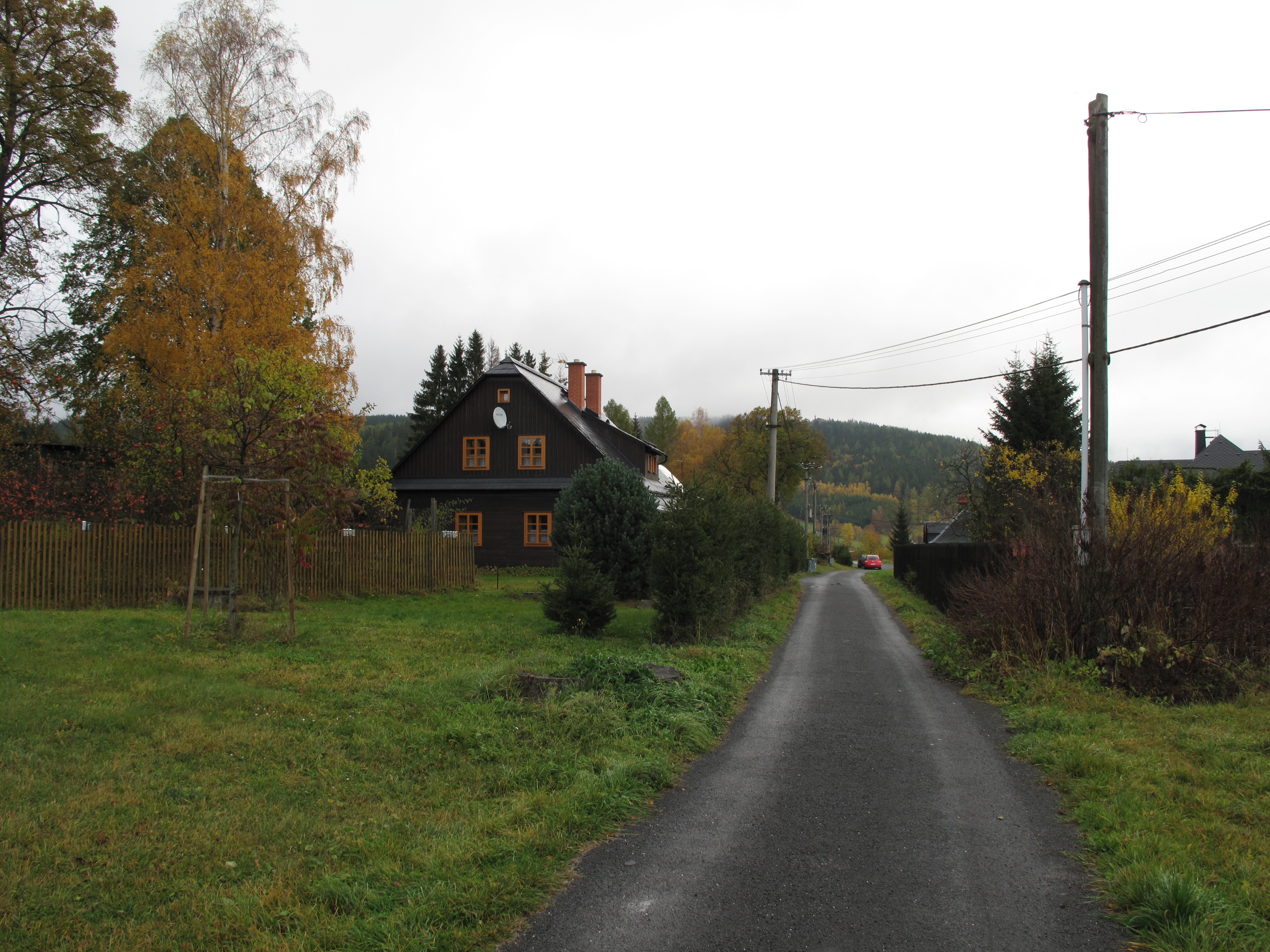 Suchá Rudná. Okres Bruntál, Česká republika.